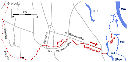 Potok Służewiecki i Kanał Sobieskiego (czerwona linia) na tle konturu Warszawy.Oznaczenia:• • • kanał zamknięty● początek Potoku Służewieckiego wg Państwowego Rejestru Nazw Geograficznych (PRNG)*1JWil - Jeziorko WilanowskieKSob - Kanał Sobieskiego (uważany często z końcowy odcinek Potoku Służewieckiego)Wil - WilanówkaWis - WisłaJPow - Jeziorko PowsinkowskieJCz - Jeziorko Czerniakowskie.Kanał zamknięty głównie na podstawie:Mariusz Barszcz. Zastosowanie modelu Santa Barbara Unit Hydrograph do symulacji hydrogramu przepływów w zlewniach zurbanizowanych. „Przegląd Geograficzny”. 86 (3), s. 381-391, 2014. część mapki wykonana przy pomocy programu GMT5*1 Według niektórych częściowo nieco nieaktualnych już map również mniej więcej w tym punkcie zaczyna się odkryty odcinek potoku. This map was created with GMT.